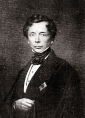 МЕДЕМ Павел Иванович Посланник России в Австрии 1848-1850